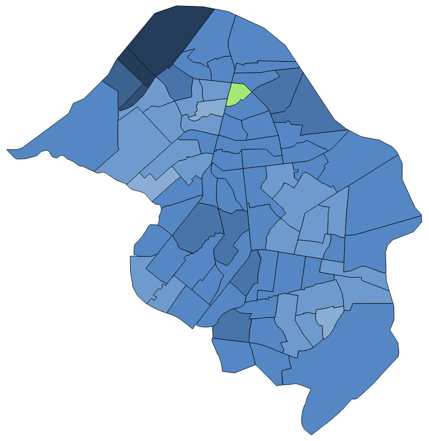 中文（台灣）: 顏色對照表